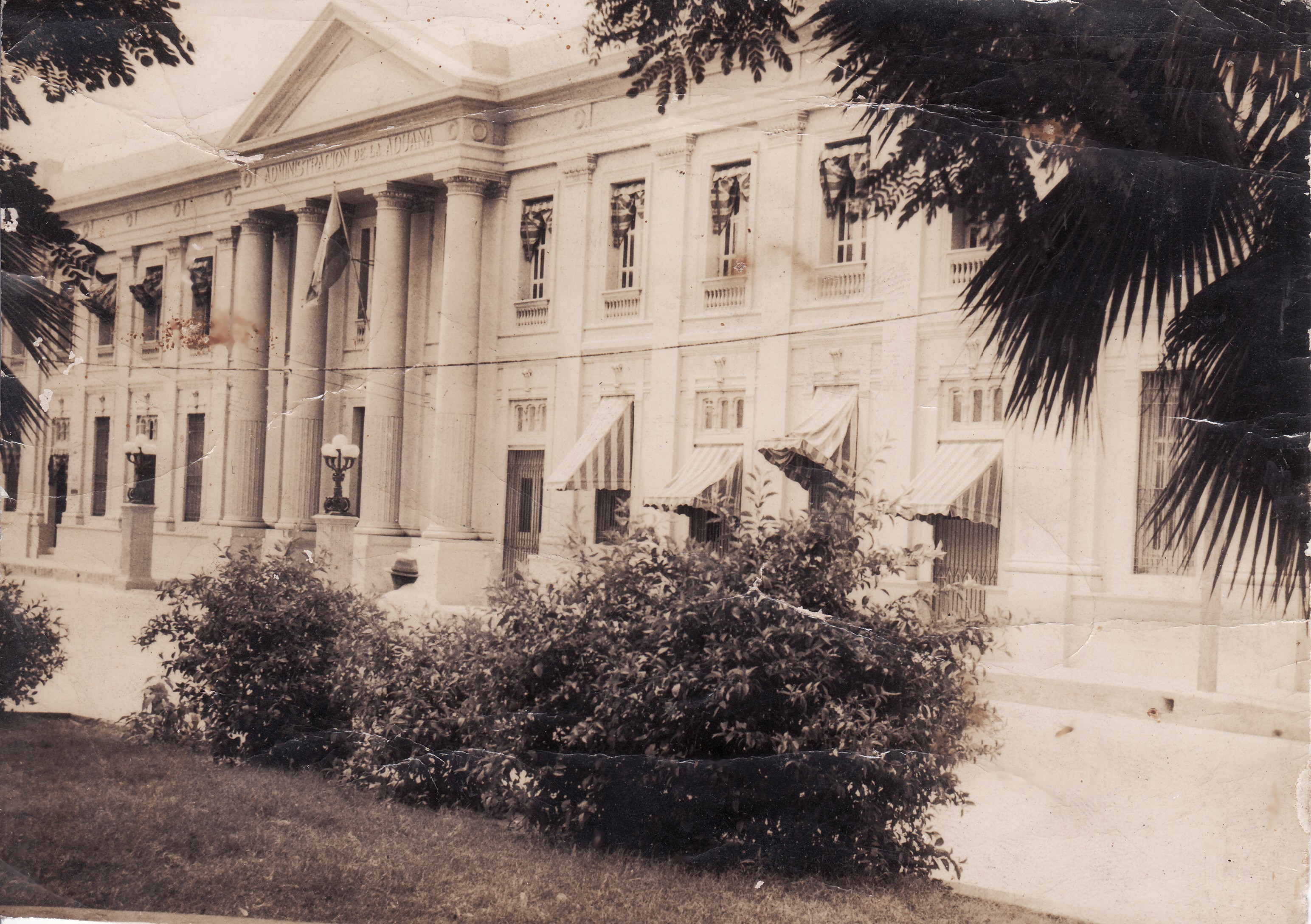 Edificio de la Aduana en la década de los 50's, Barranquilla (Colombia)